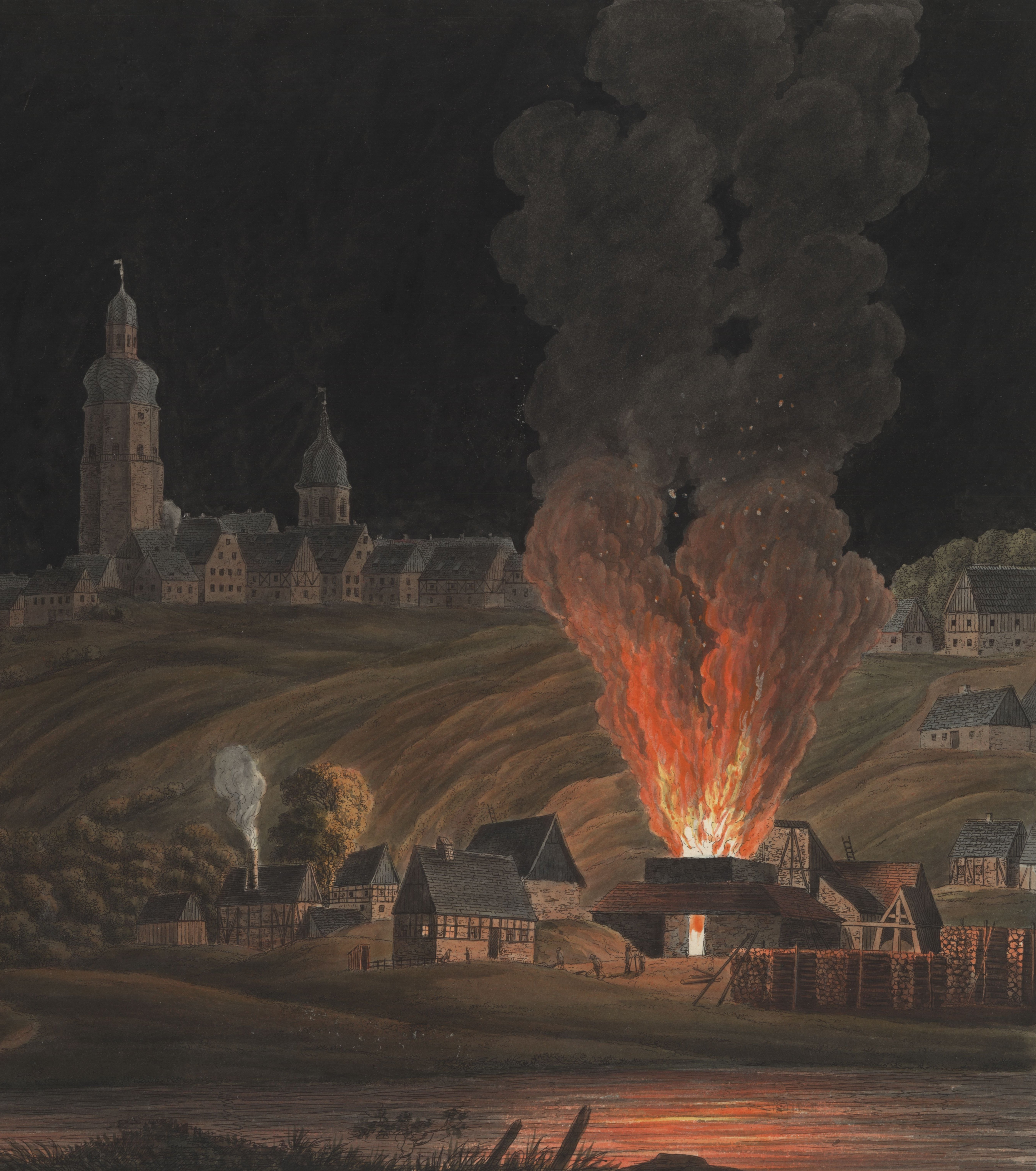 Ansicht von Johanngeorgenstadt im Erzgebirge, kolor. Umrissradierung, um 1830